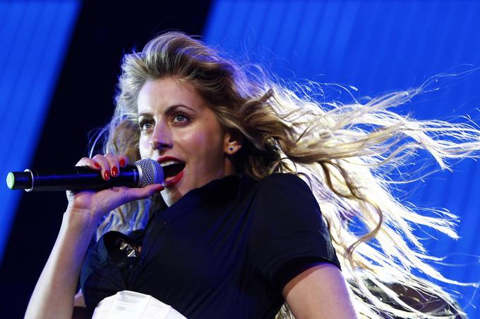 Kata en vivo, cantando su sencillo Paradise.